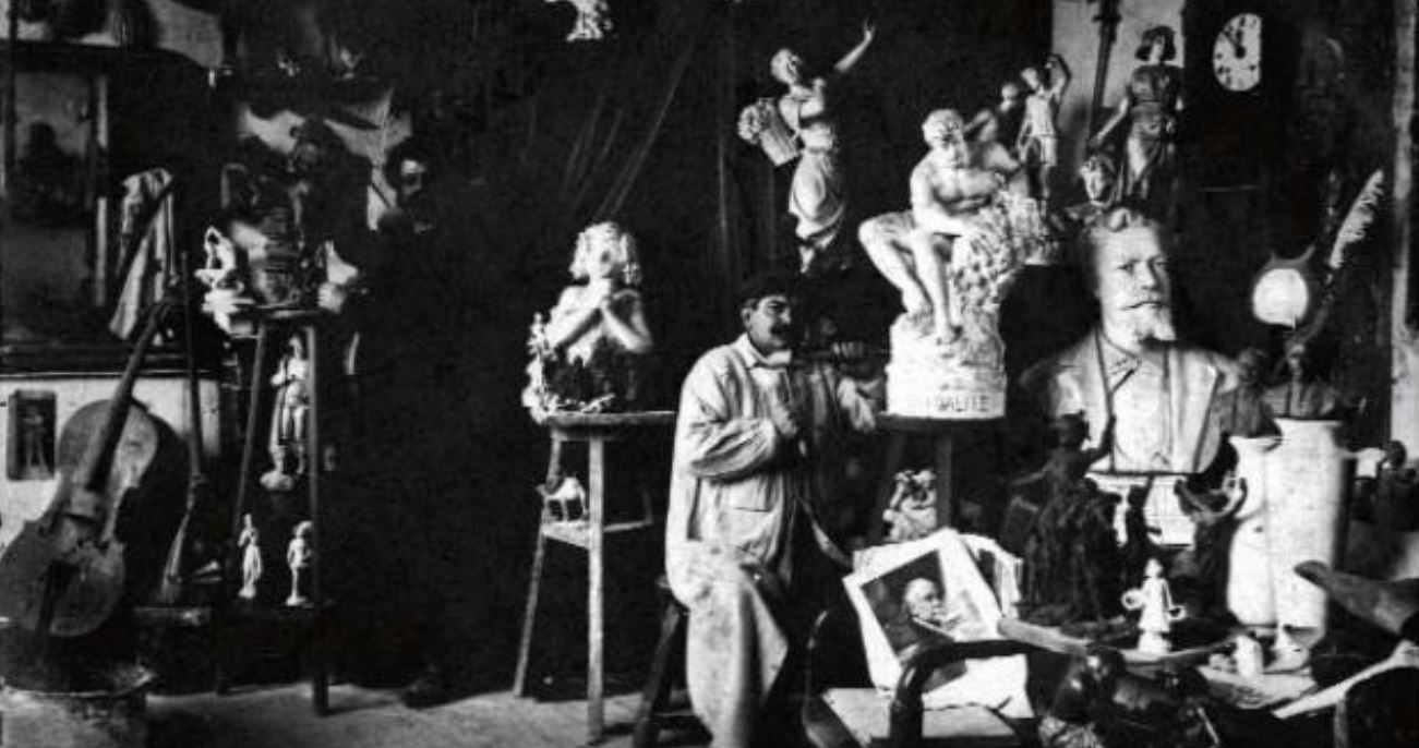 Georges Omerth in seinem Atelier. Sein Assistent steht im Schatten an der linken Seite des Vorhangs.